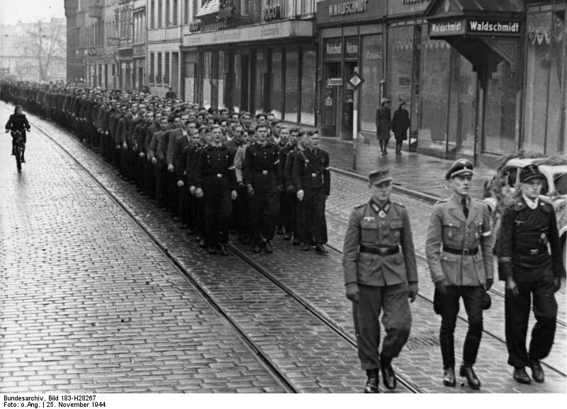 Kriegsfreiwillige für Division Grossdeutschland Scherl Bilderdienst "Großdeutschland" - Kriegsfreiwillige rücken ein. Die durch nichts zu erschütternde Siegeszuversicht des Deutschen Volkes kann nicht besser gekennzeichnet werden als durch die Tatsache des unaufhörlichen Freiwilligenstromes, der jetzt auch im 6. Kriegsjahr den verschiedenen Waffengattungen zuströmt. Täglich rücken in Arbeitsdienst, in Wehrertüchtigungslagern und anderen vormilitärischen Lehrgängen der HJ bestens vorgebildete junge Männer in den Waffendienst ein. Von fronterfahrenen Ausbildern mit den neuesten und besten Waffen ausgebildet werden sie in absehbarerZeit an der Front stehen. Unsere Bilder zeigen die in schlichtem, erhebendem Rahmen einer militärischen Feierstund einrückenden Kriegsfreiwilligen einer Ersatz-Einheit der Pz.-Gren.-Div. "Großdeutschland geleitet von einem Bannführer derHJ. Aufnahme: Schwahn 1801-44 Zentralbild II.Weltkrieg 1939 - 45 Junge Menschen vom Arbeitsdienst, aus Wehrertüchtigungslagern und vormilitärischen Lehrgängen der HJ melden sich im 6. Kriegsjahr als Kriegsfreiwillige zur Panzer-Grenadier-Division "Grossdeutschland" . U.B.z: die Kriegsfreiwilligen marschieren am 25.11.1944, geführt von einem HJ-Bannführer und zwei Ritterkreuzträgern der Division "Grossdeutschland", zum Marktplatz ihrer Garnisonstadt, wo sie bei einer militärischen Feierstunde von der Ersatz-Einheit der Panzer-Grenadier-Division "Grossdeutschland" übernommen werden. 1801-44